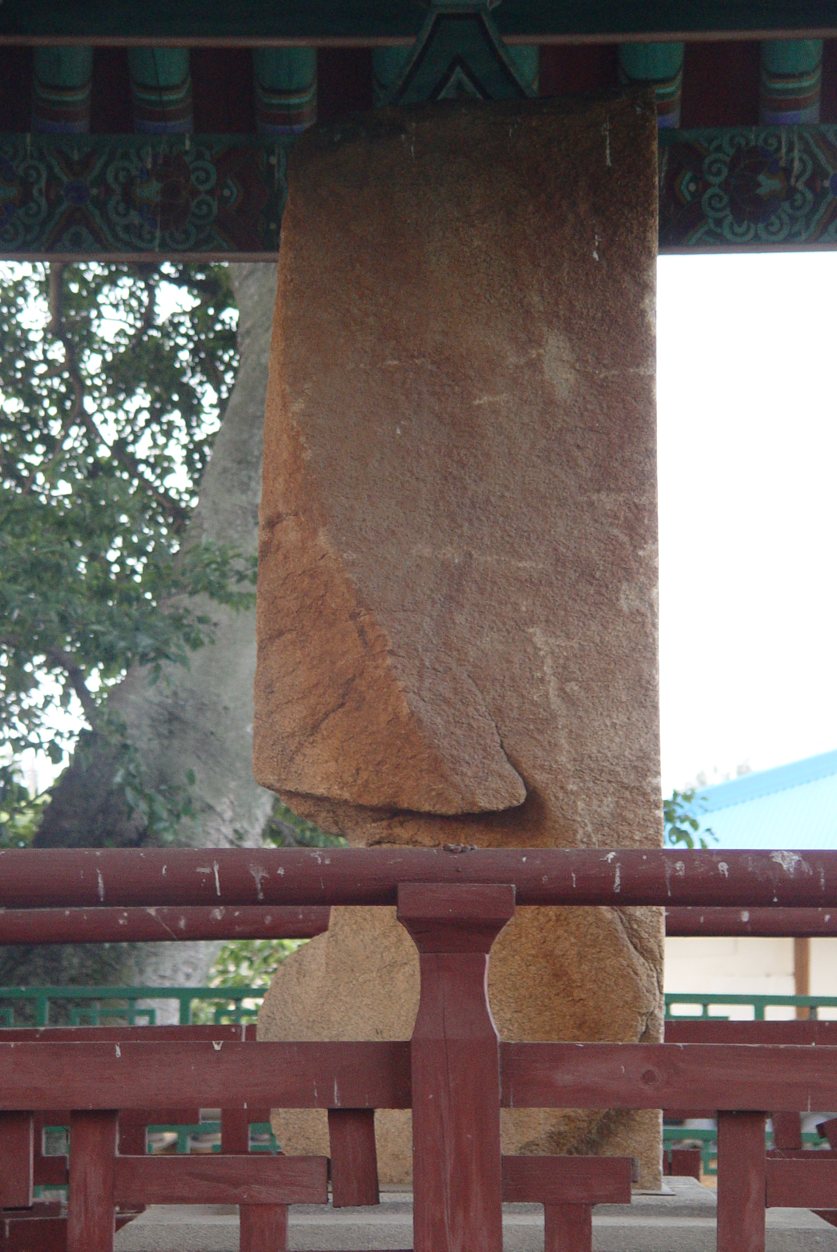 봉평리 신라비